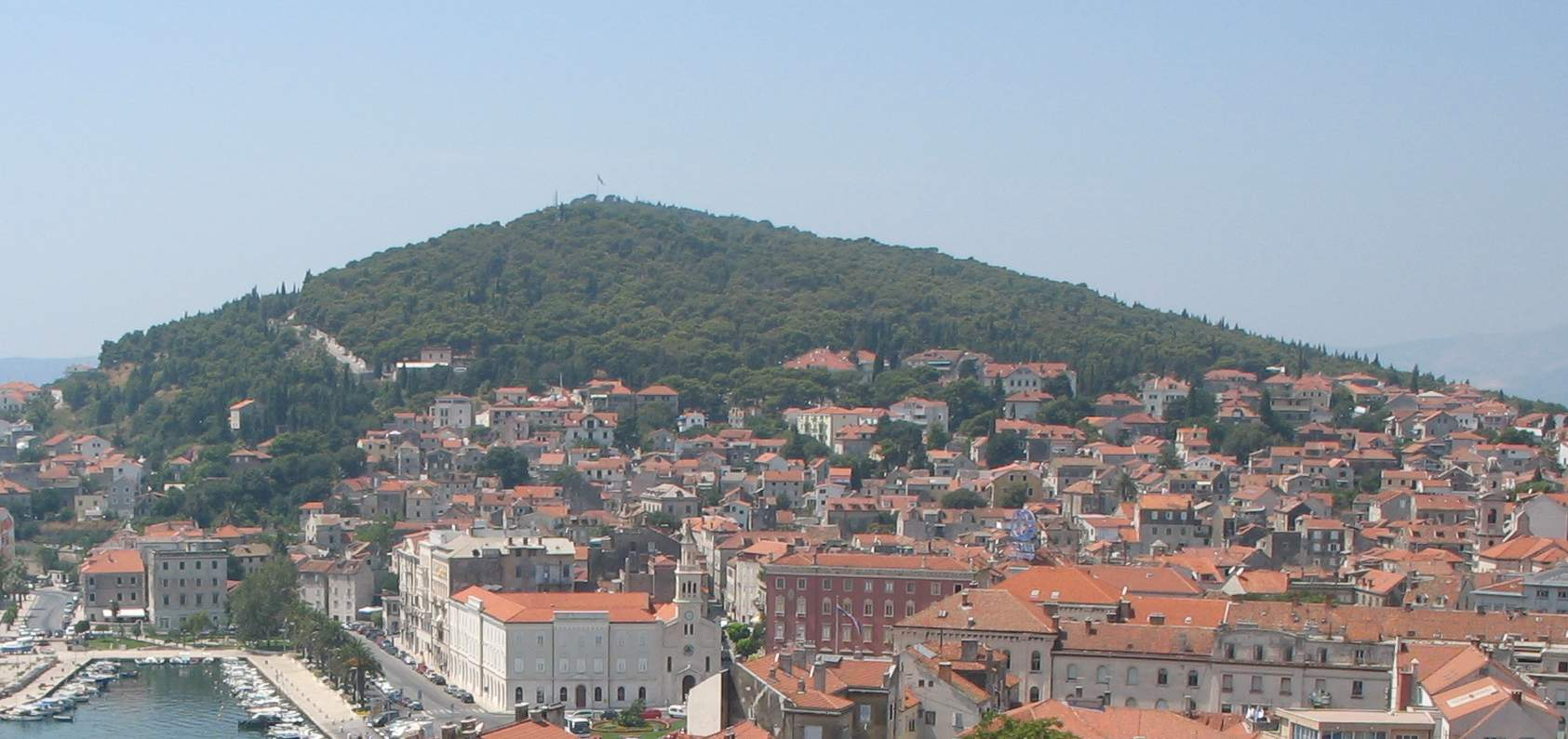 Veli Varoš. Moja fotografija